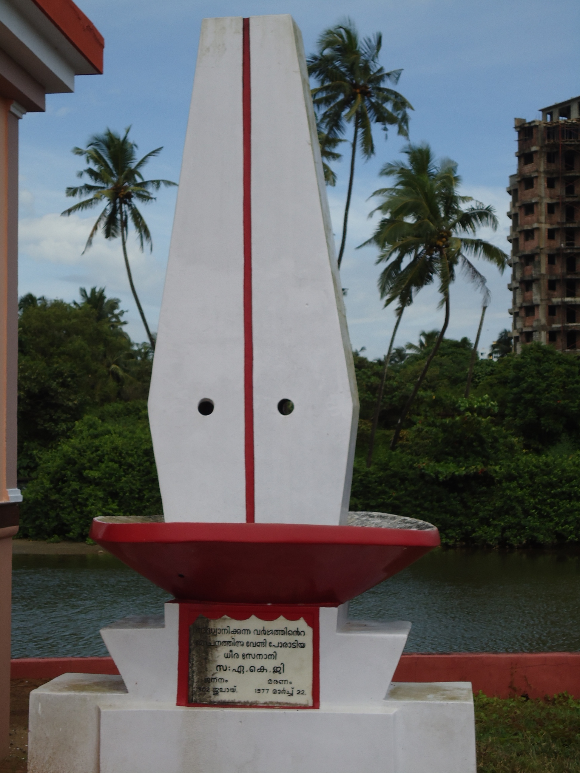 എകെ ഗോപാലന്റെ ശവകുടീരം